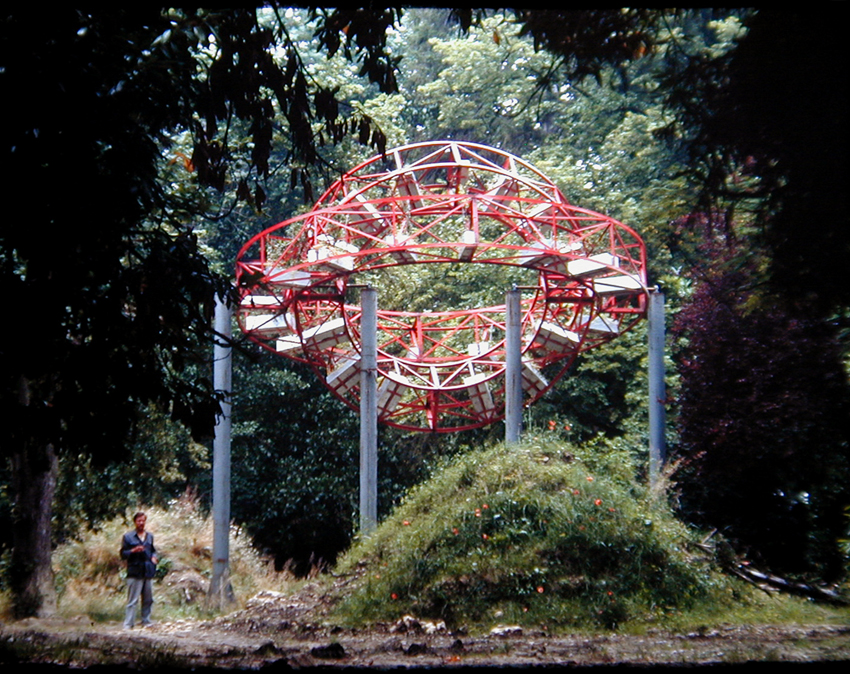 Sculpture métallique Sculpture et prise de vue par Jean-Max Albert